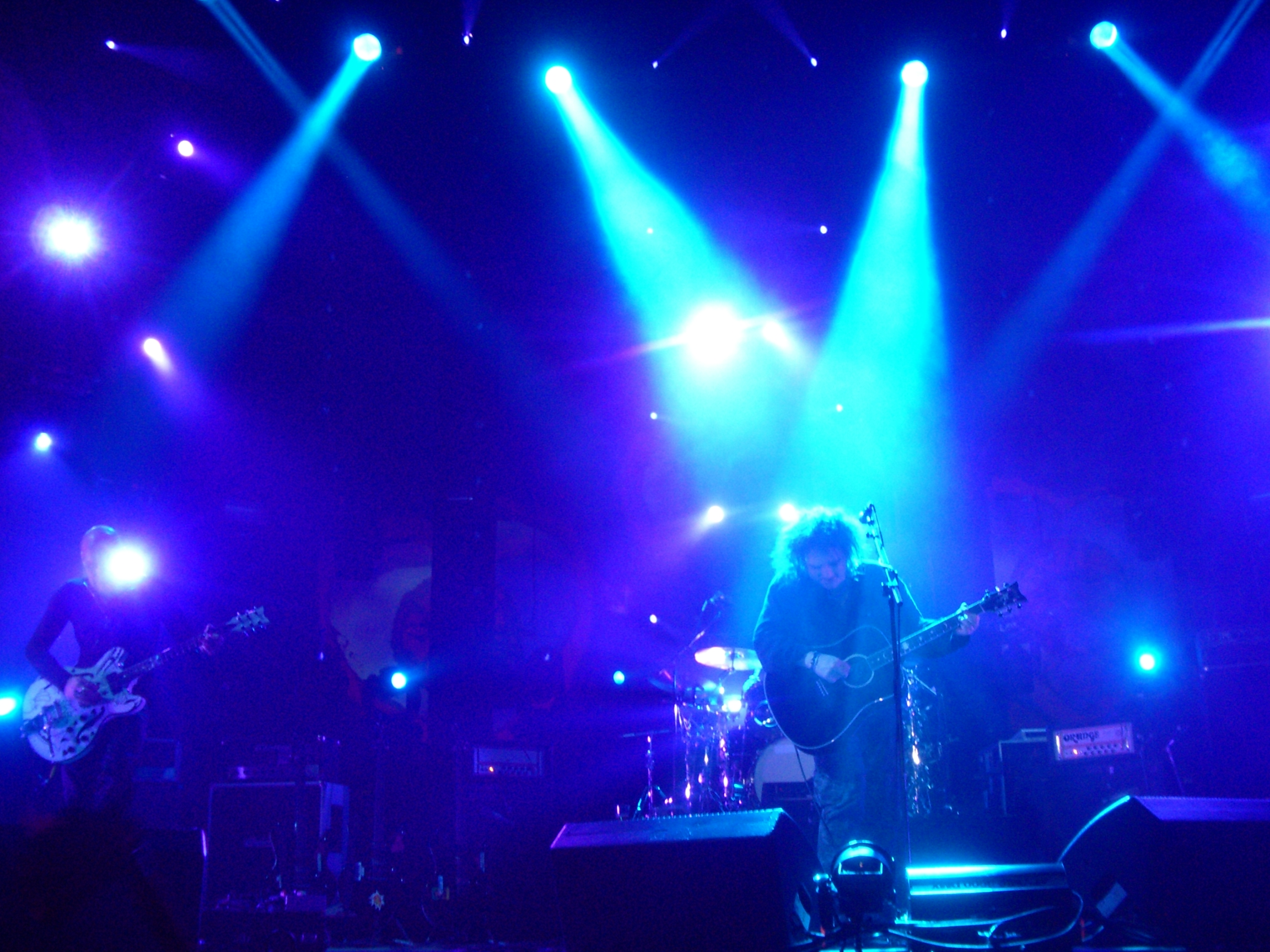 The Cure Ahoy